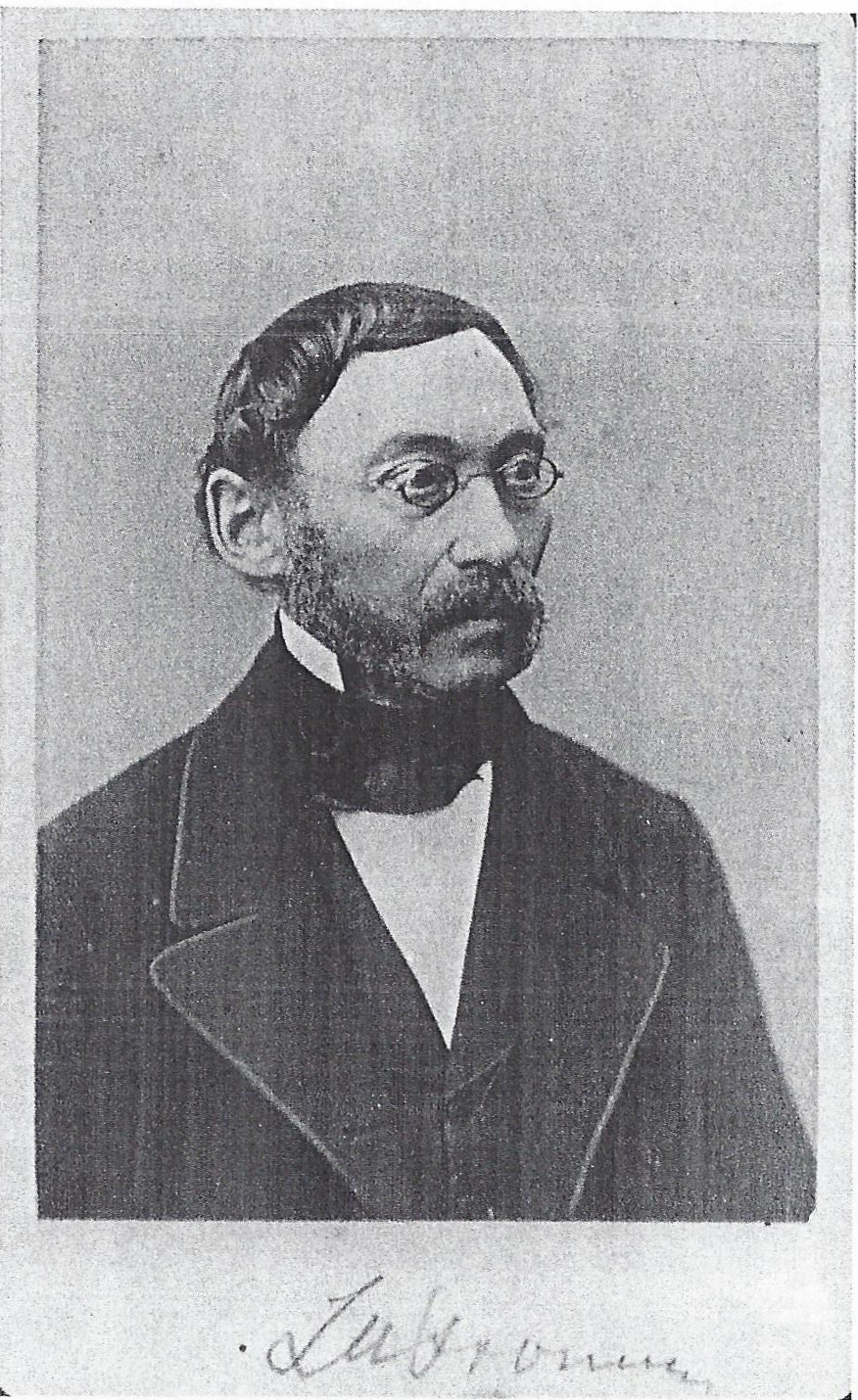 Porträtfotograie von Ludolph Ulrich Fromme (1813-1896)